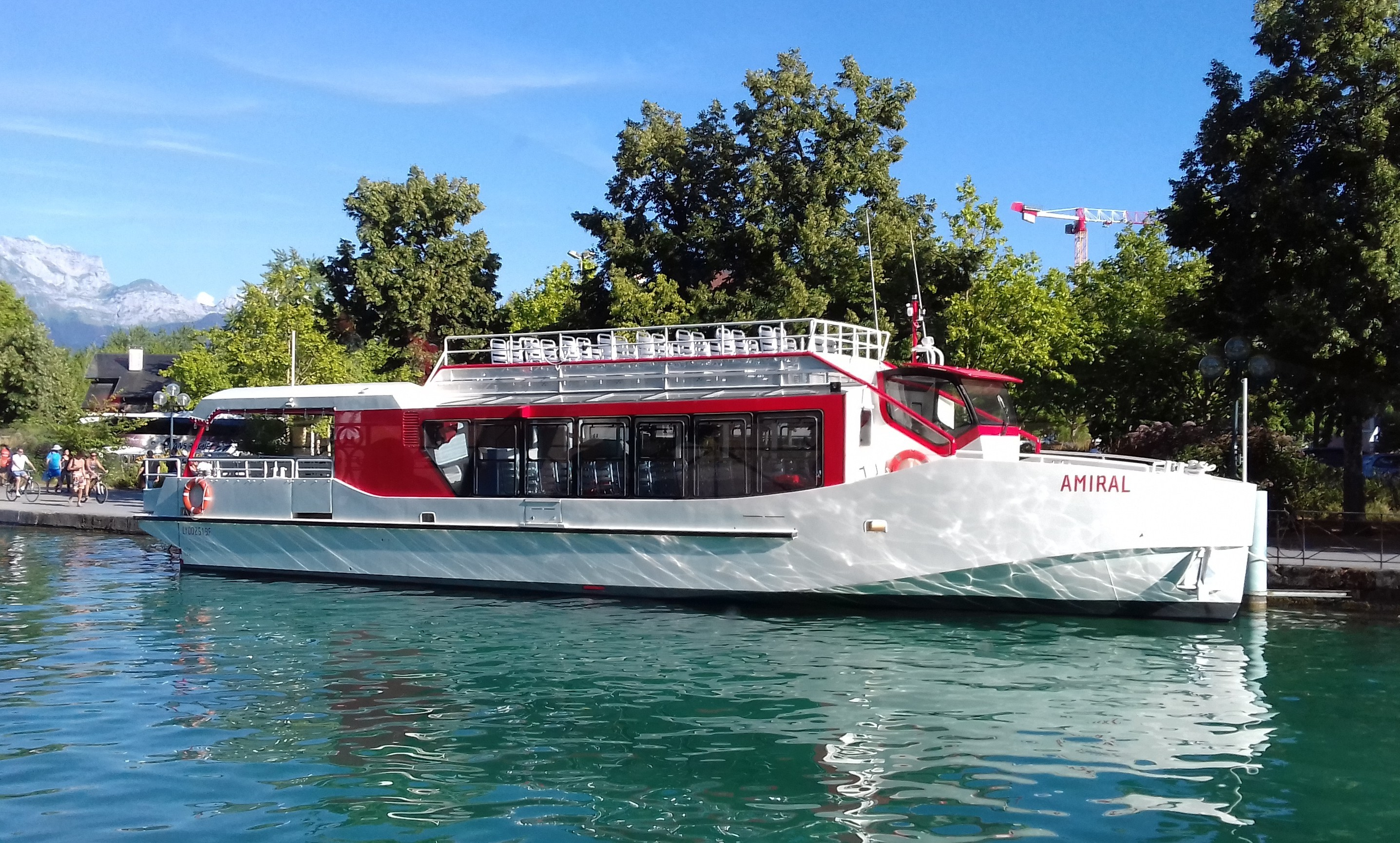 Bateau Amiral à quai à Annecy en juillet 2020.